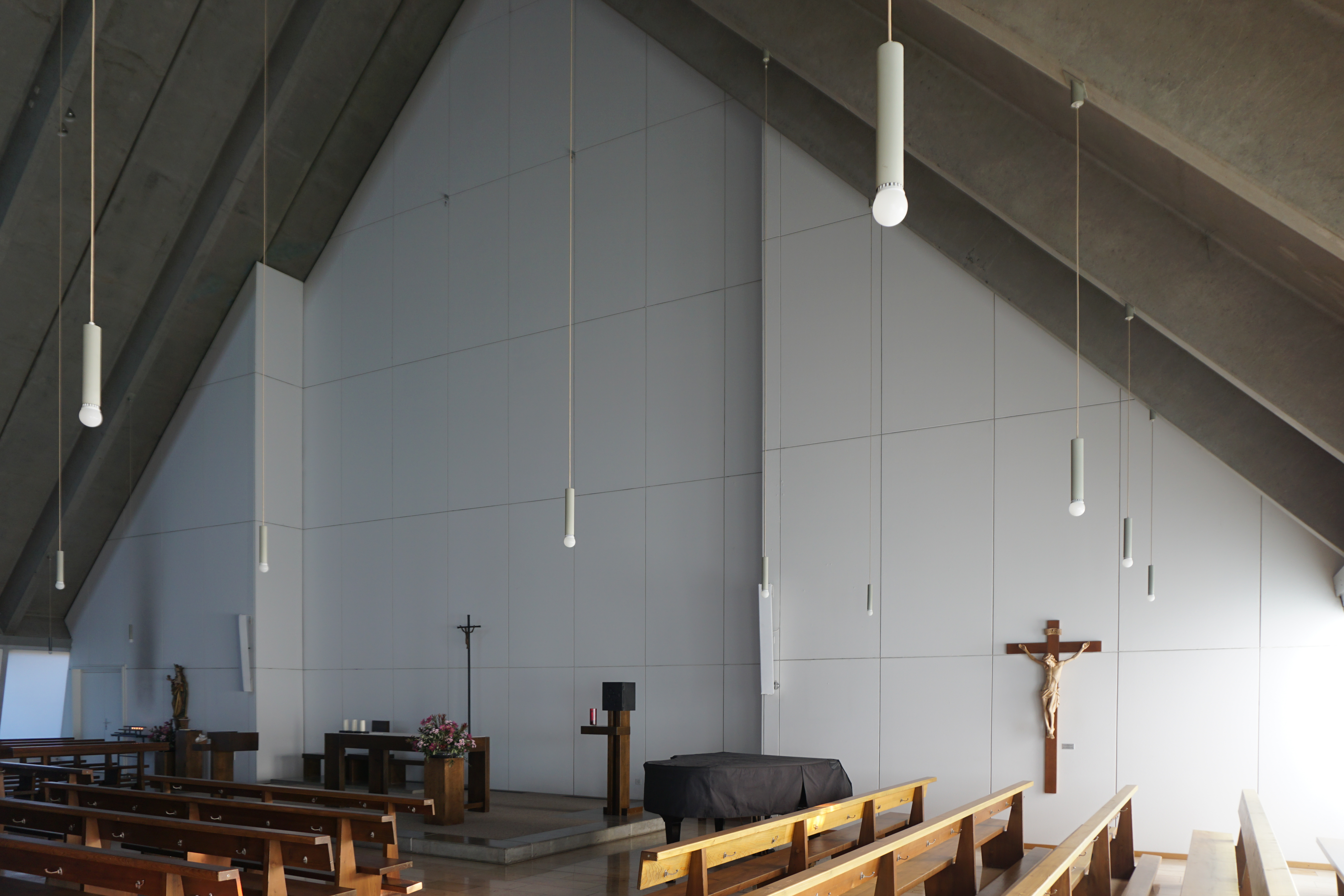 Johanneskirche Innen